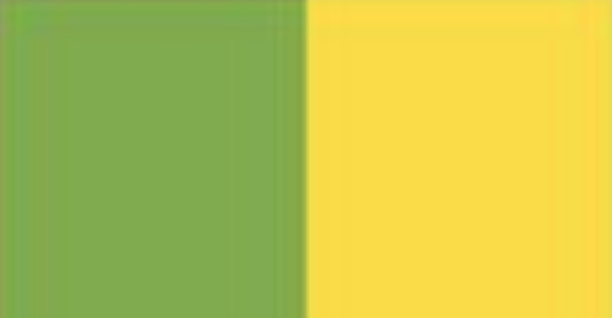 Bandera de Écija oficial en el Valle de Écija, San Carlos Sija Guatemala, Centro América.